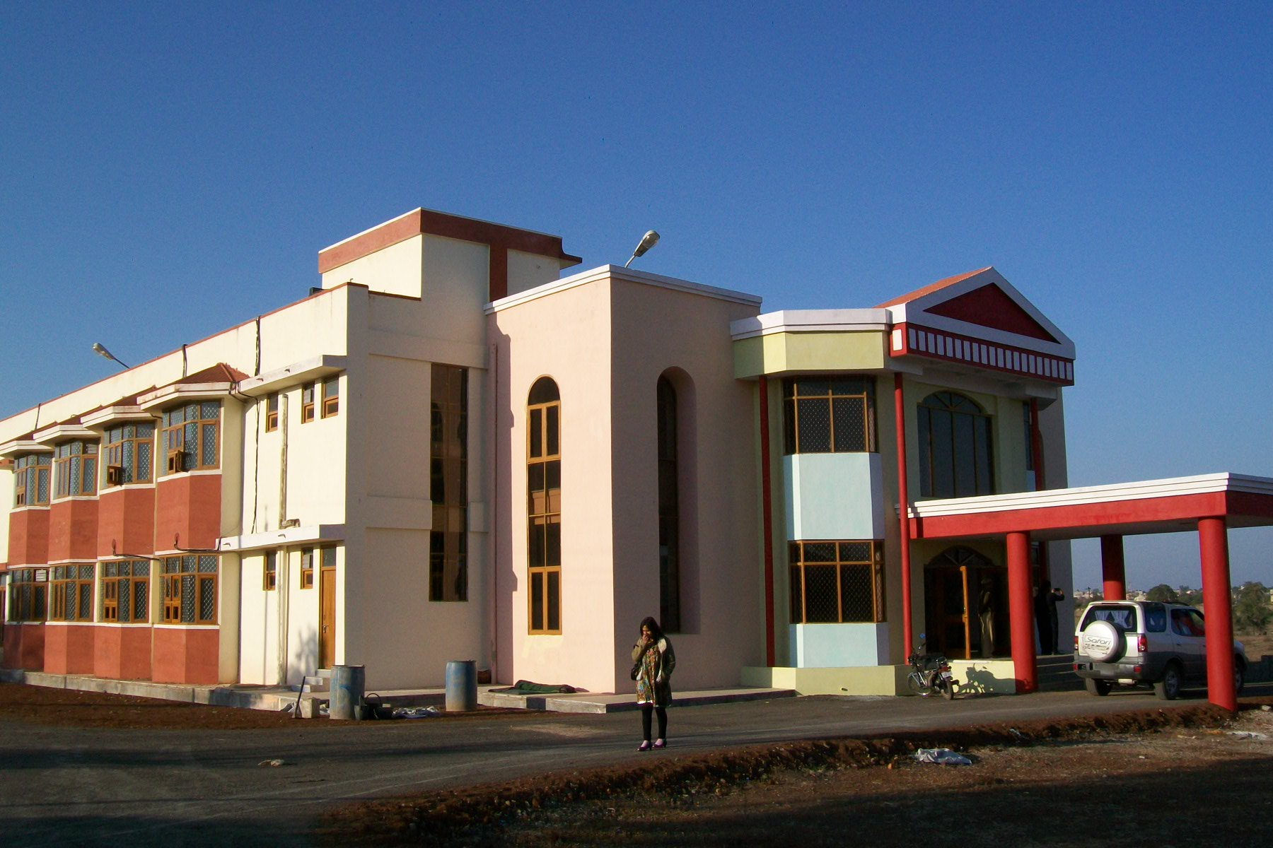 प्रतापगढ़ में नवनिर्मित सर्किट-हाउस